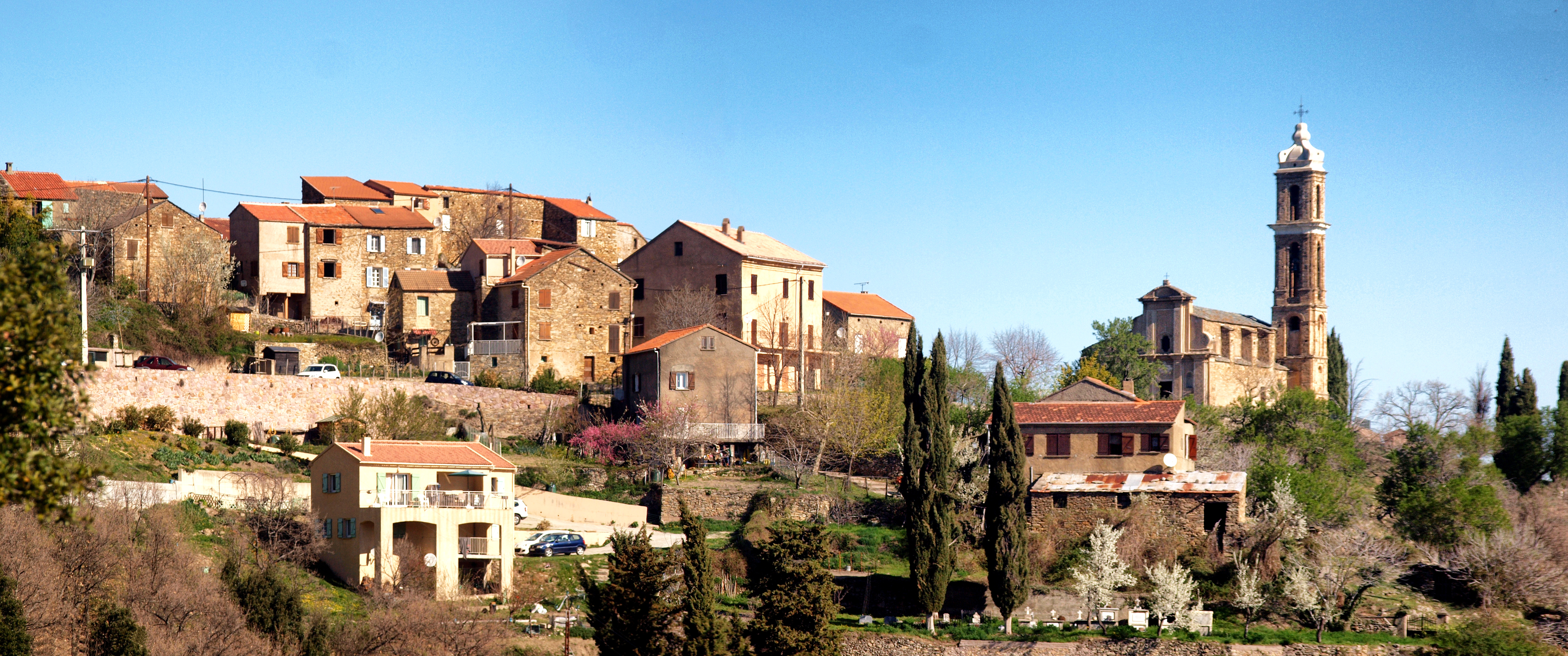 Aiti, Casaluna (Castagniccia/Haute-Corse) - Panorama du village